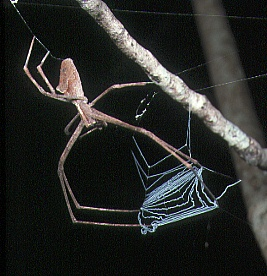 Avella species from Australia.